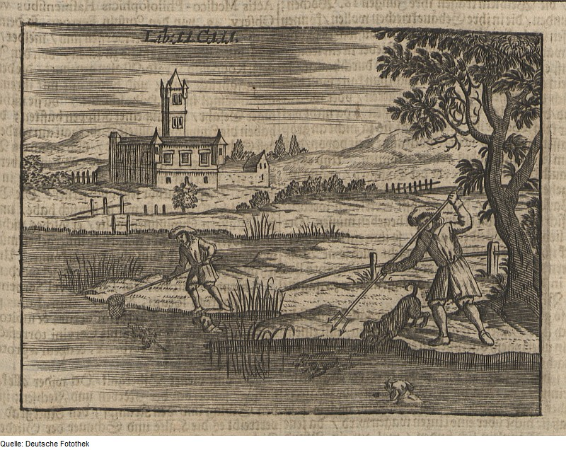 Original image description from the Deutsche Fotothek Jagdwesen & Nagetier